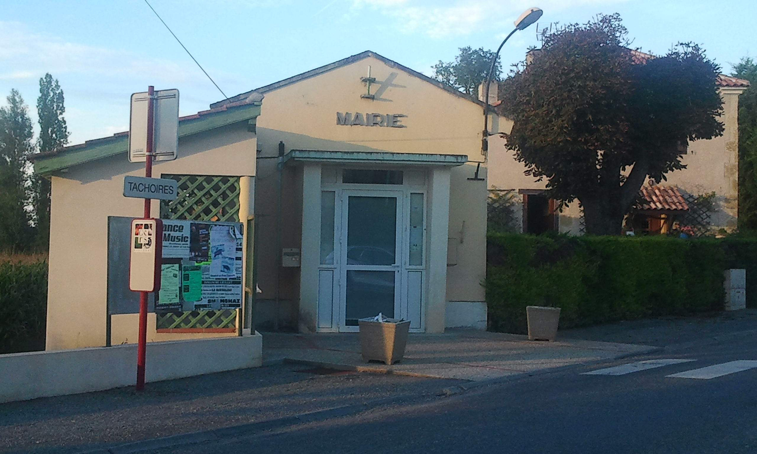 La mairie de Tachoires